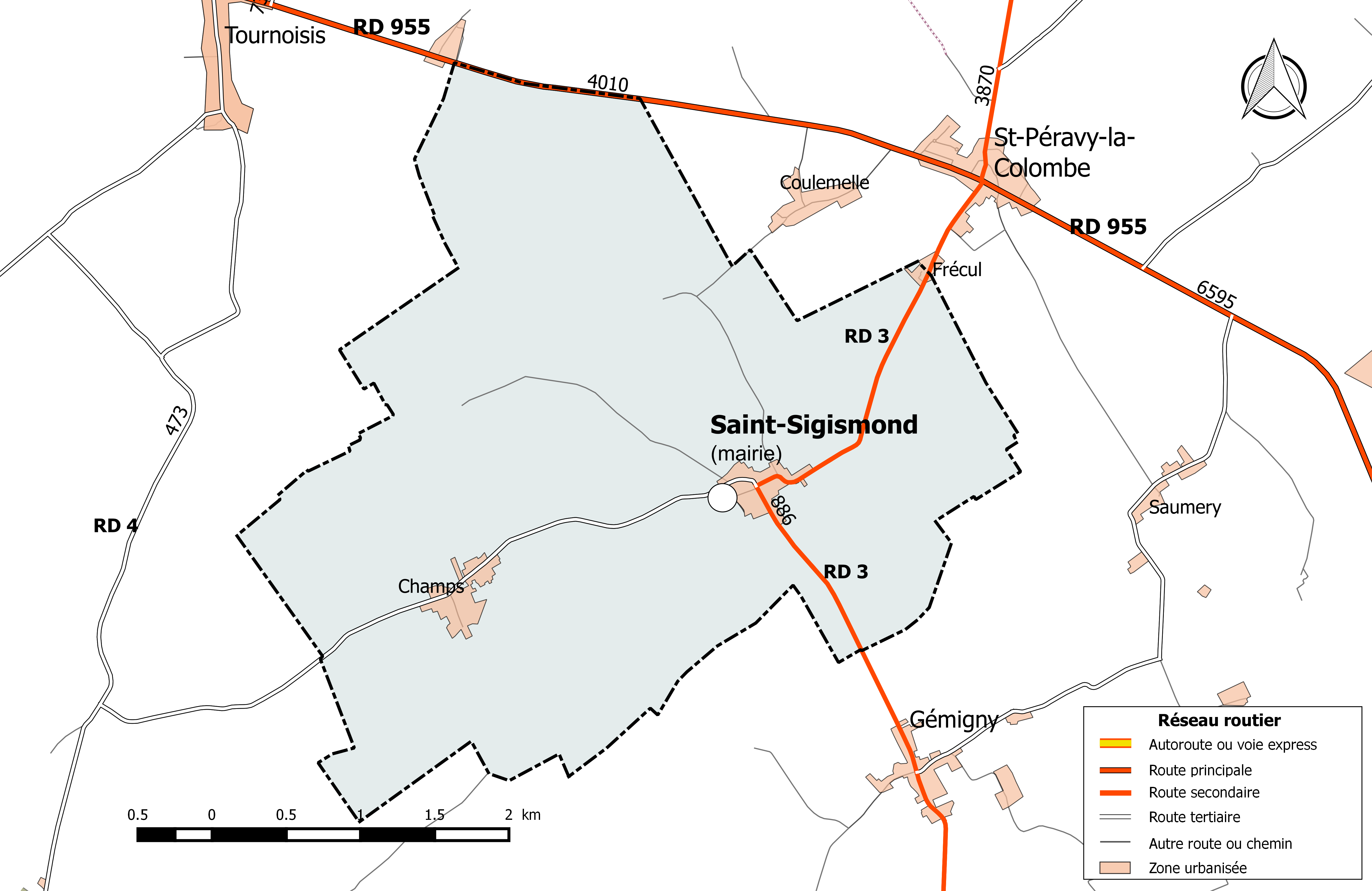 Carte du réseau routier de la commune de Saint-Sigismond (Loiret).